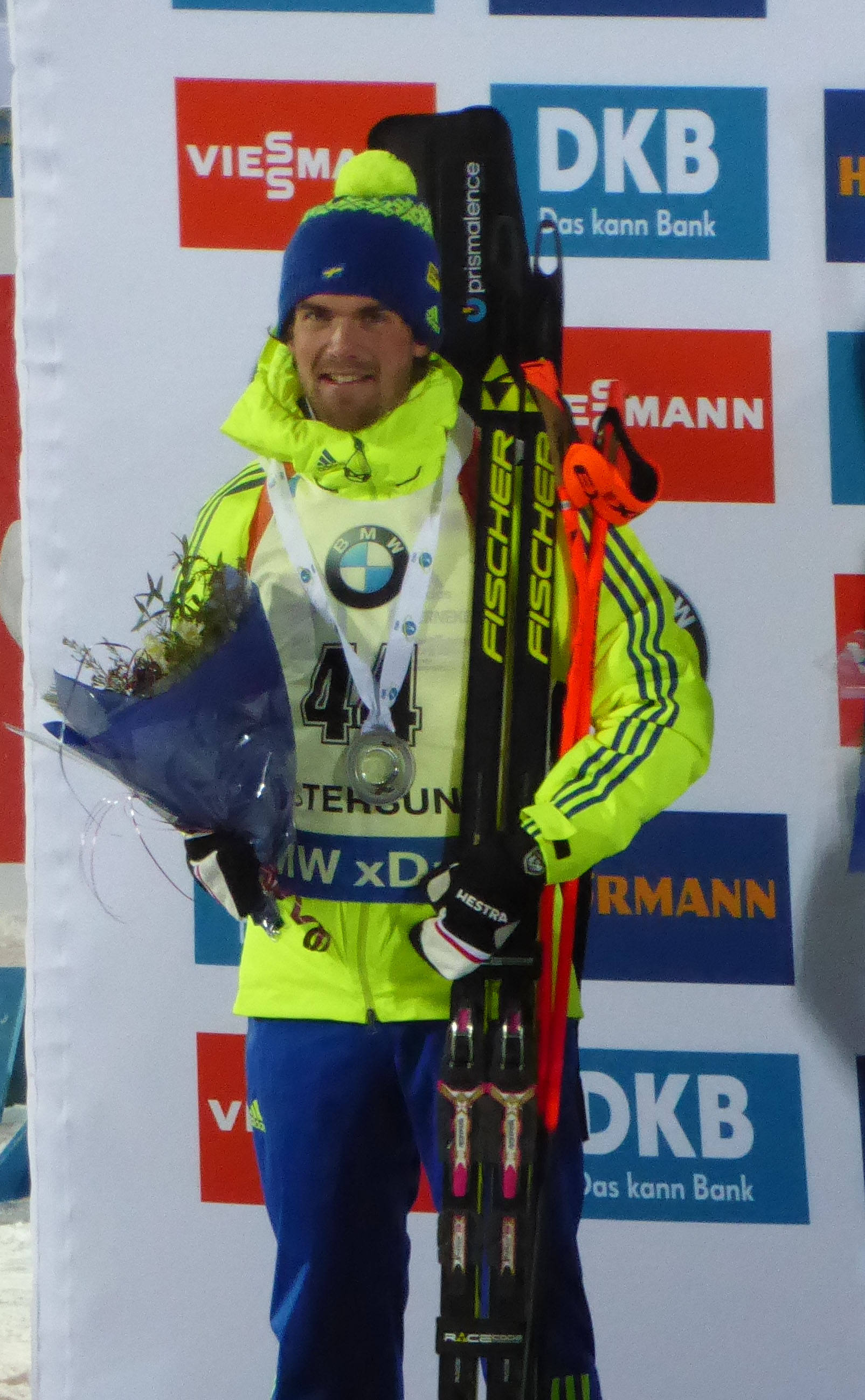 Fredrik Lindström på prispallen vid Sprinttävlingen i Världscupen i Östersund 2016